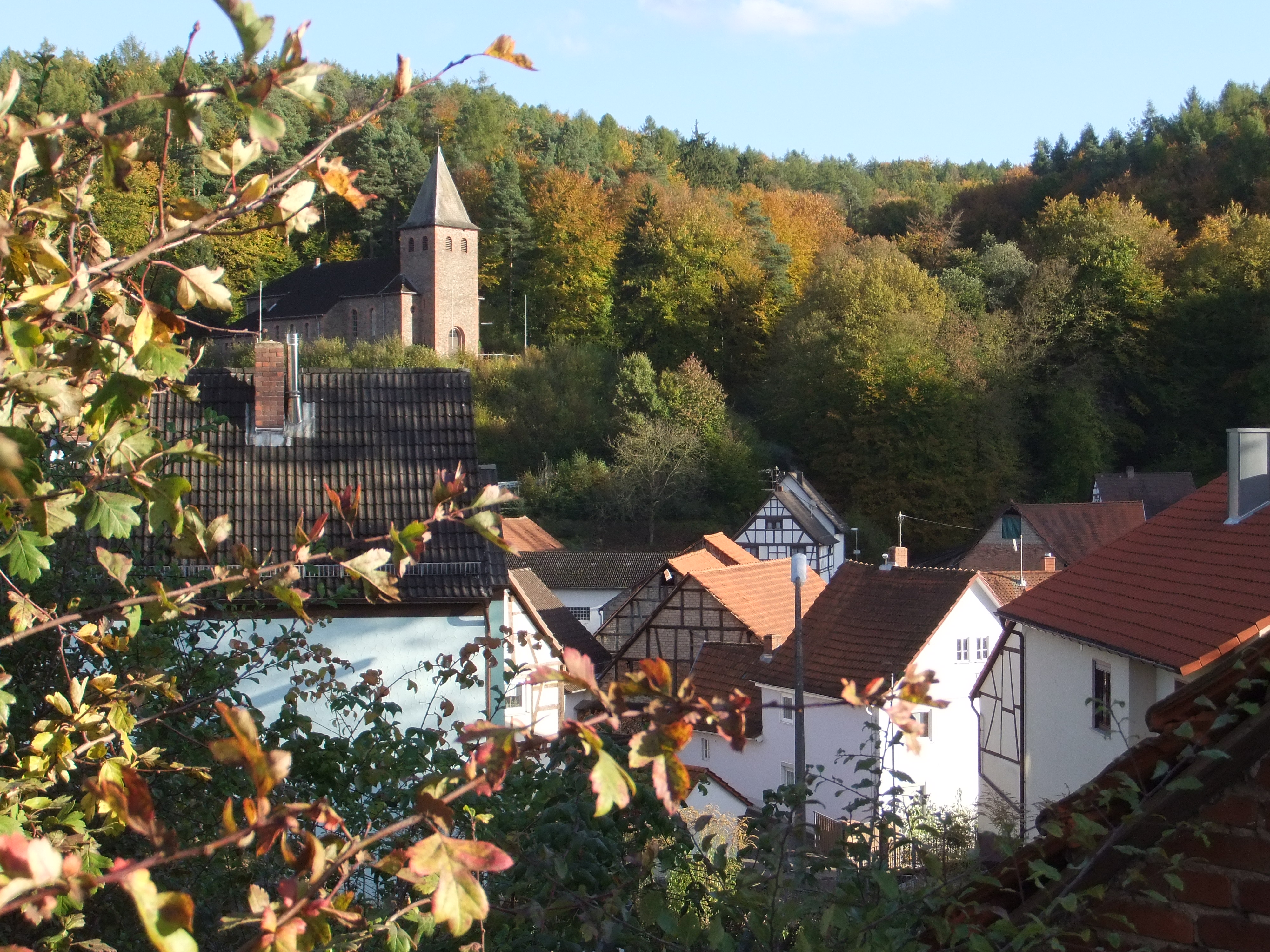 Ortsbild von Reichenbach